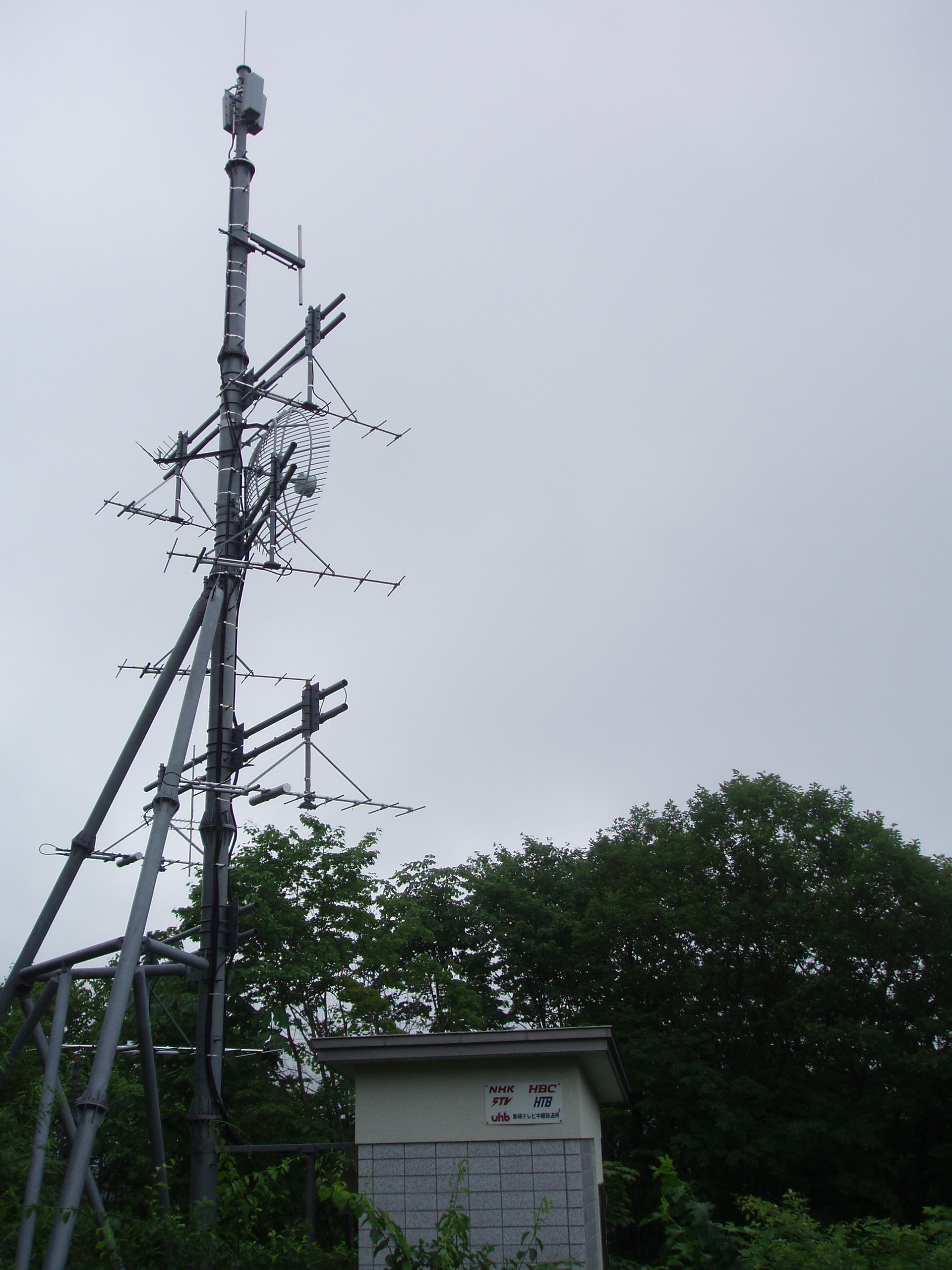 新得中継局 NHK・HBC・STV・HTB・UHB送信設備